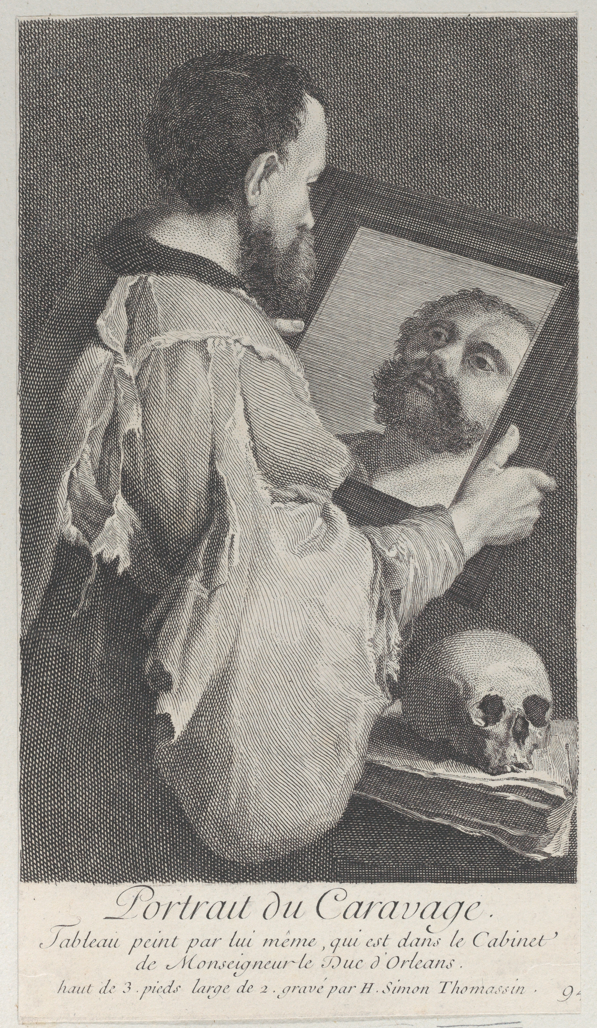 Henri Simon Thomassin, Portrait du Caravage / Tableau peint par lui même, qui est dans le Cabinet de Monseigneur le Duc d'Orleans, MET. Grabado a buril según copia de José de Ribera, Filósofo ante el espejo, del que se conocen varias réplicas